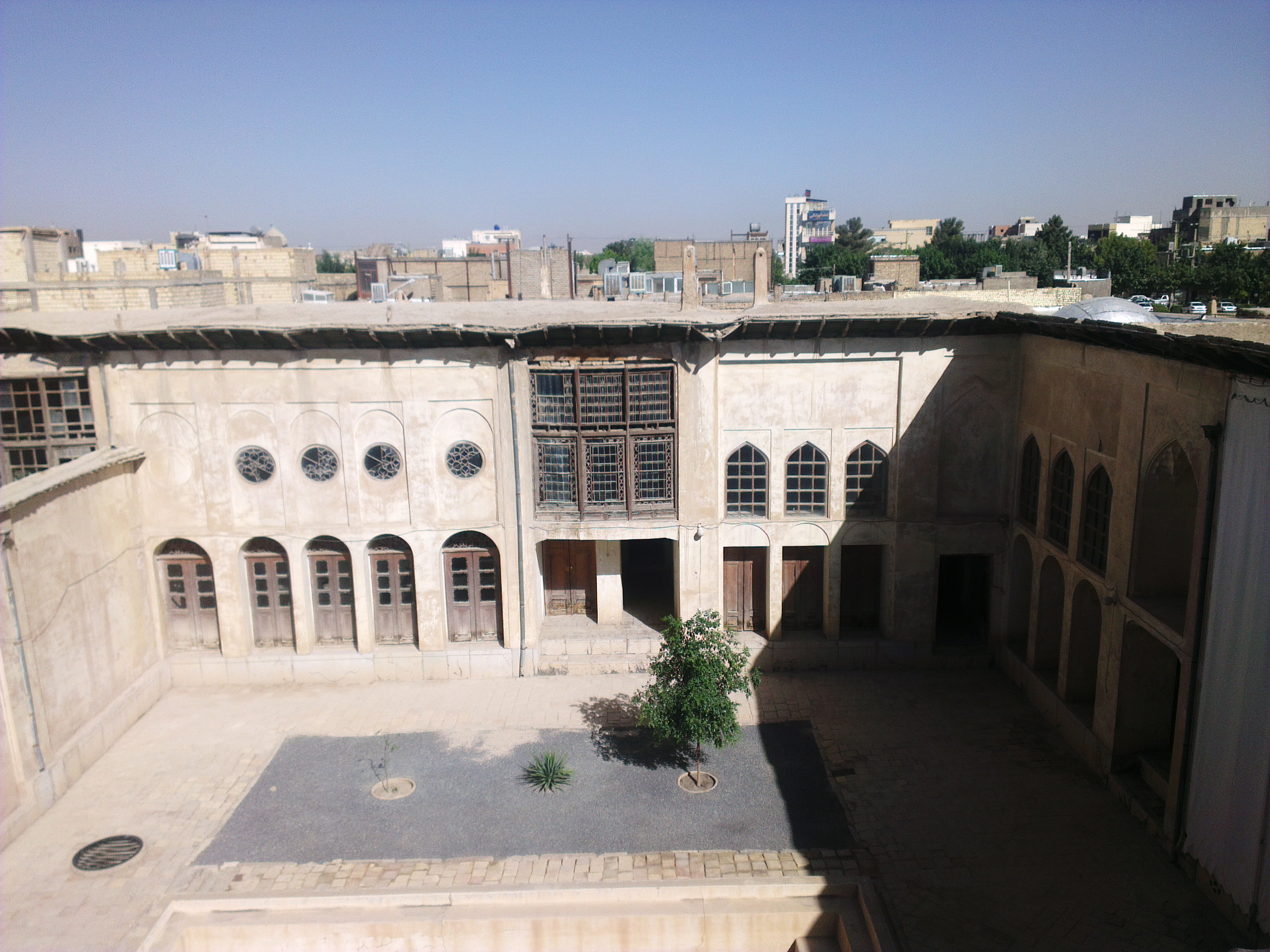 عمارت خان در منطقه خوراسگان اصفهان مربوط به عصر صفوی و زندیه